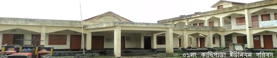 কাছিপাড়া ইউনিয়ন পরিষদের সামনের ফটক